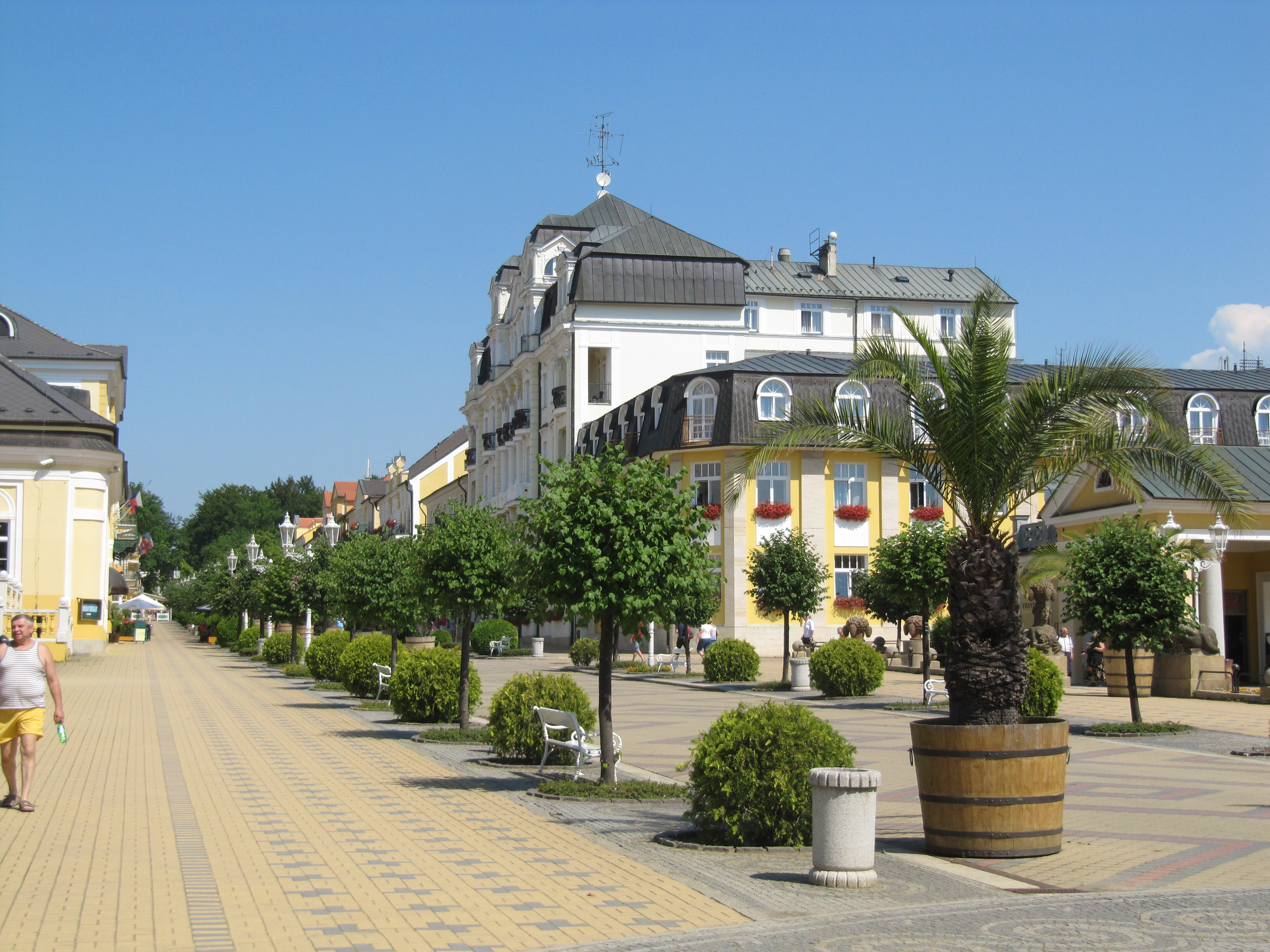 Františkovy Lázně, Národní ulice.